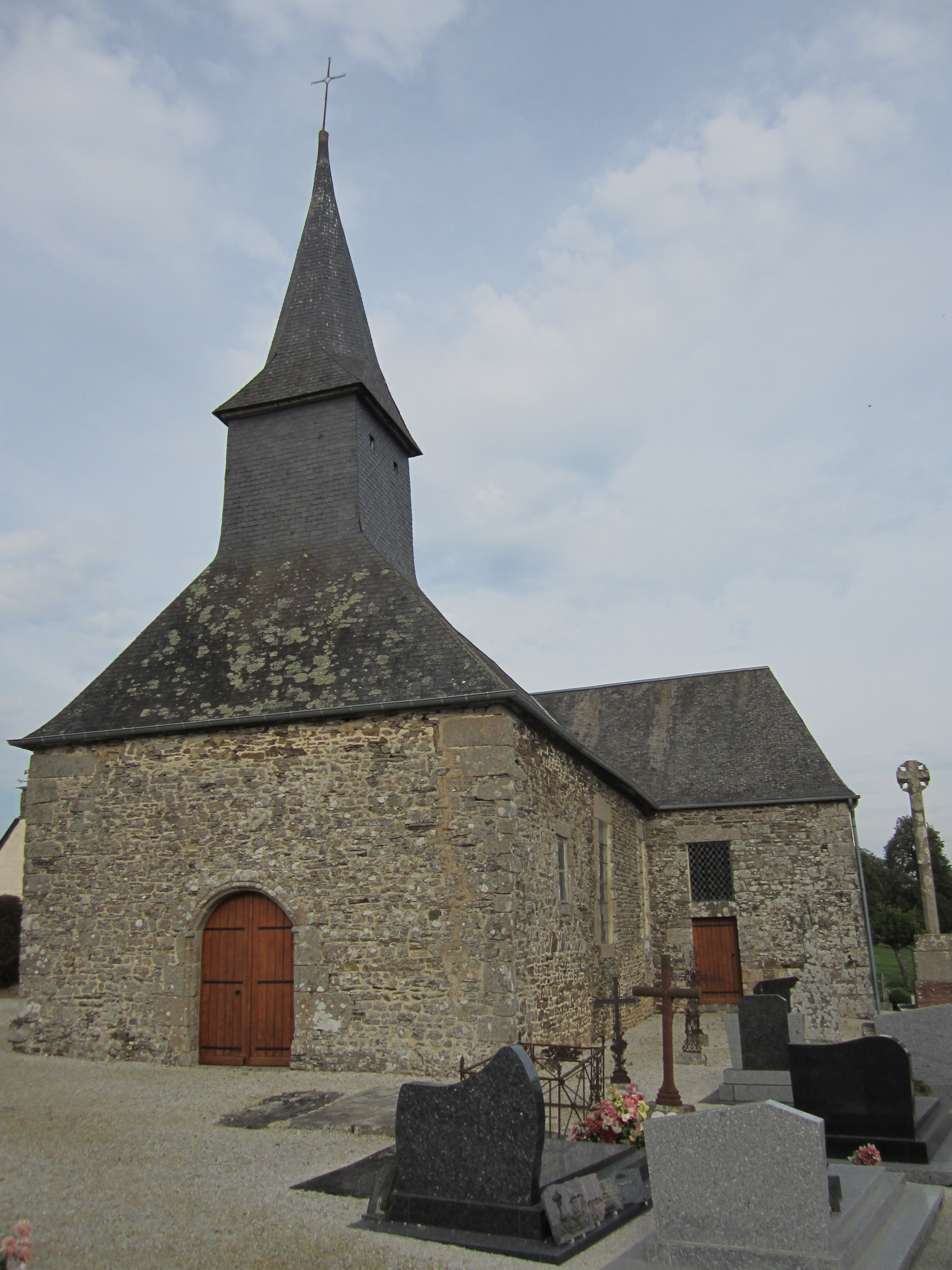 Ferrières, Manche